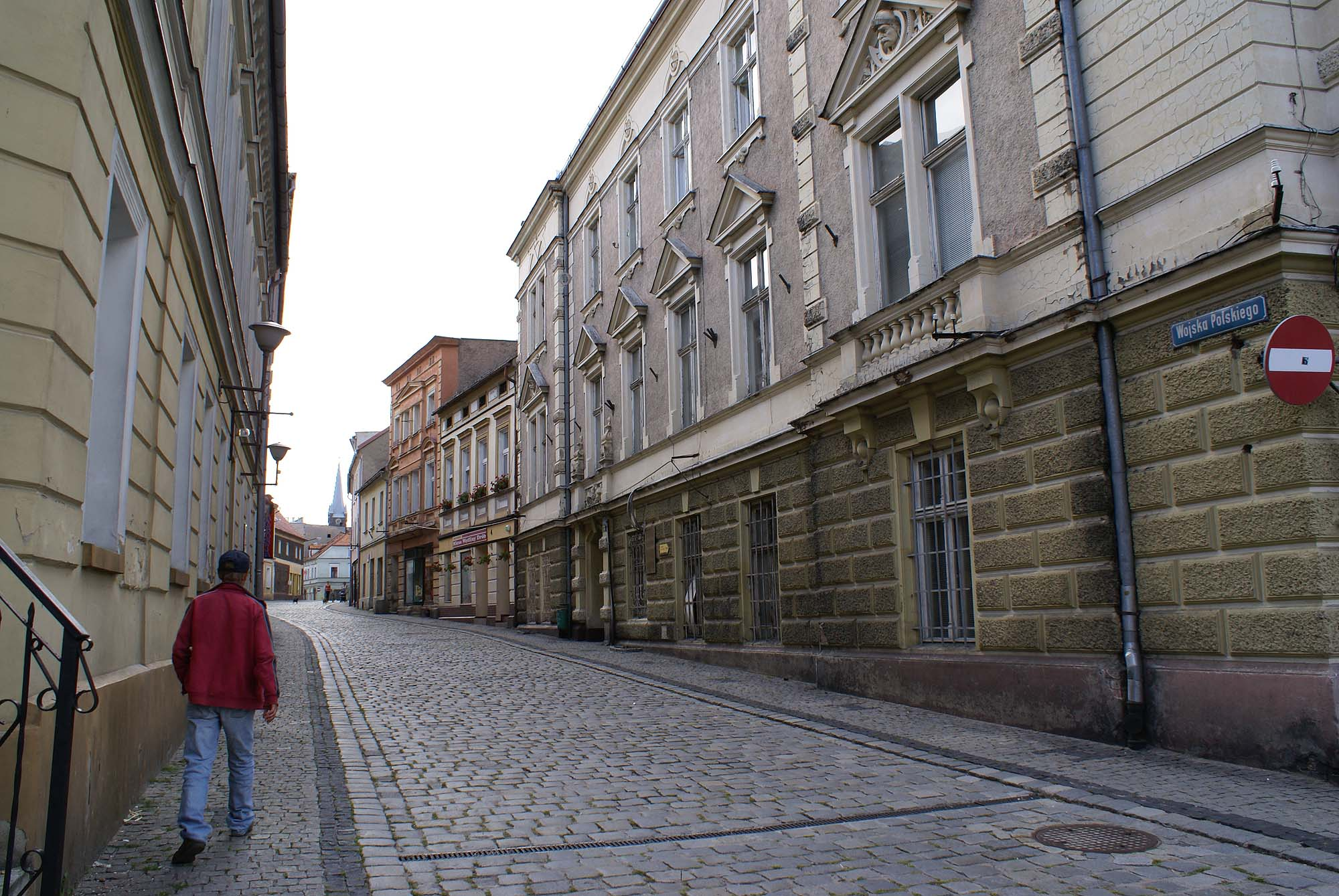 Złoty Stok, obszar staromiejski